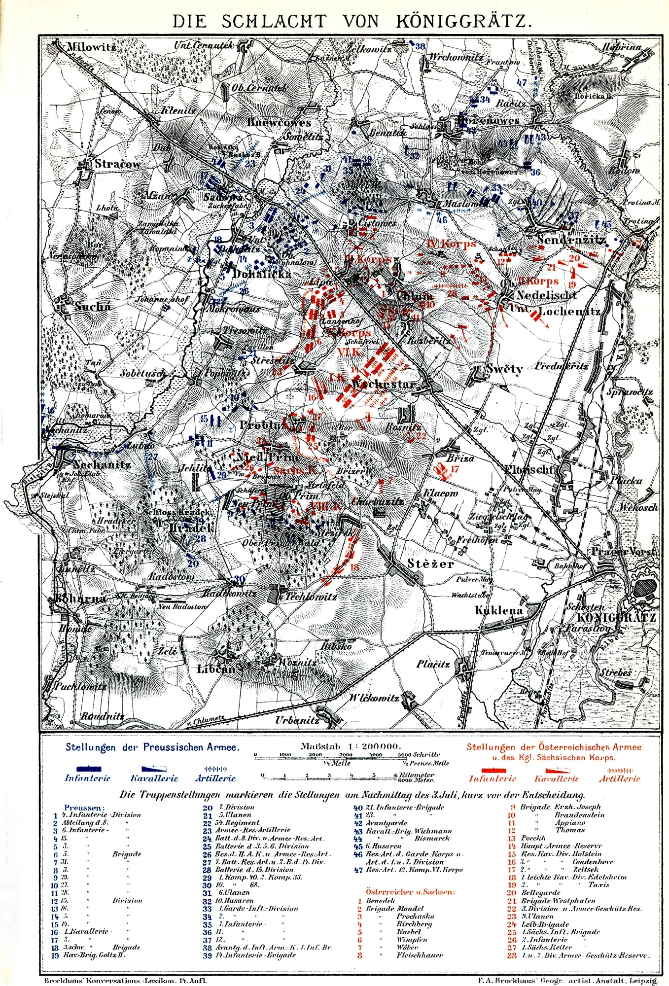 taktische Karte, Schlacht bei Königgrätz 3. Juli 1866